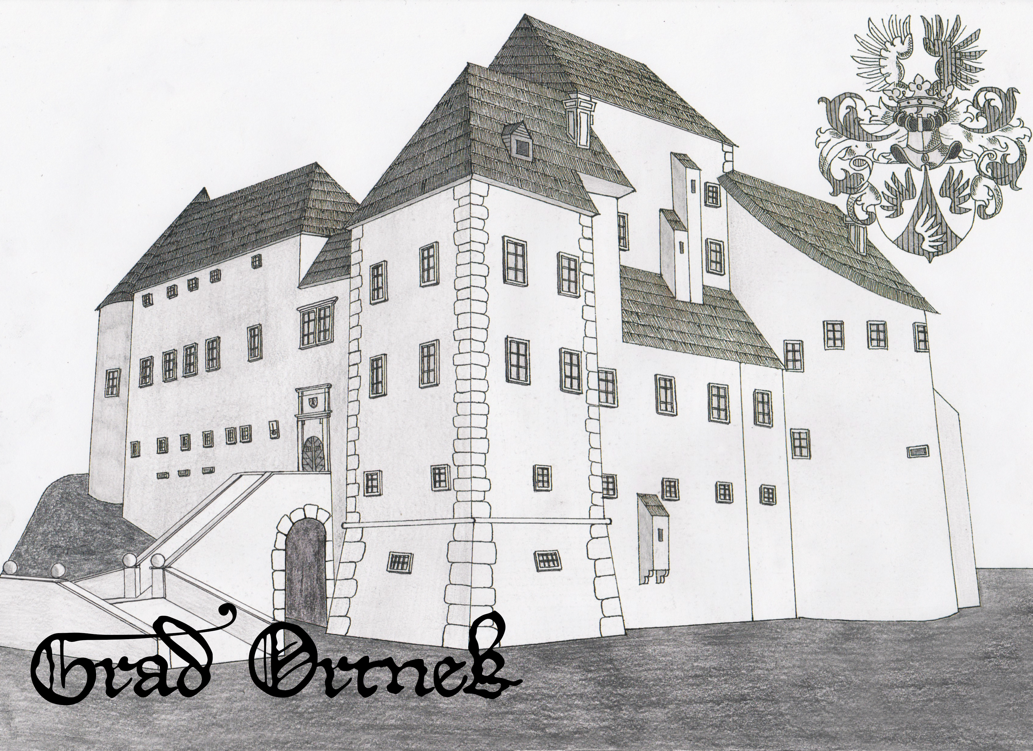 Poskus rekonstrukcije gradu Ortnek pri Ribnici v 19. stol. Delano s pomočjo skicne osnove doc. dr. Igorja Sapača in tlorisa gradu.